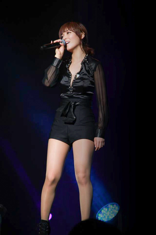 Sunye en "Wonder World Tour Asia"